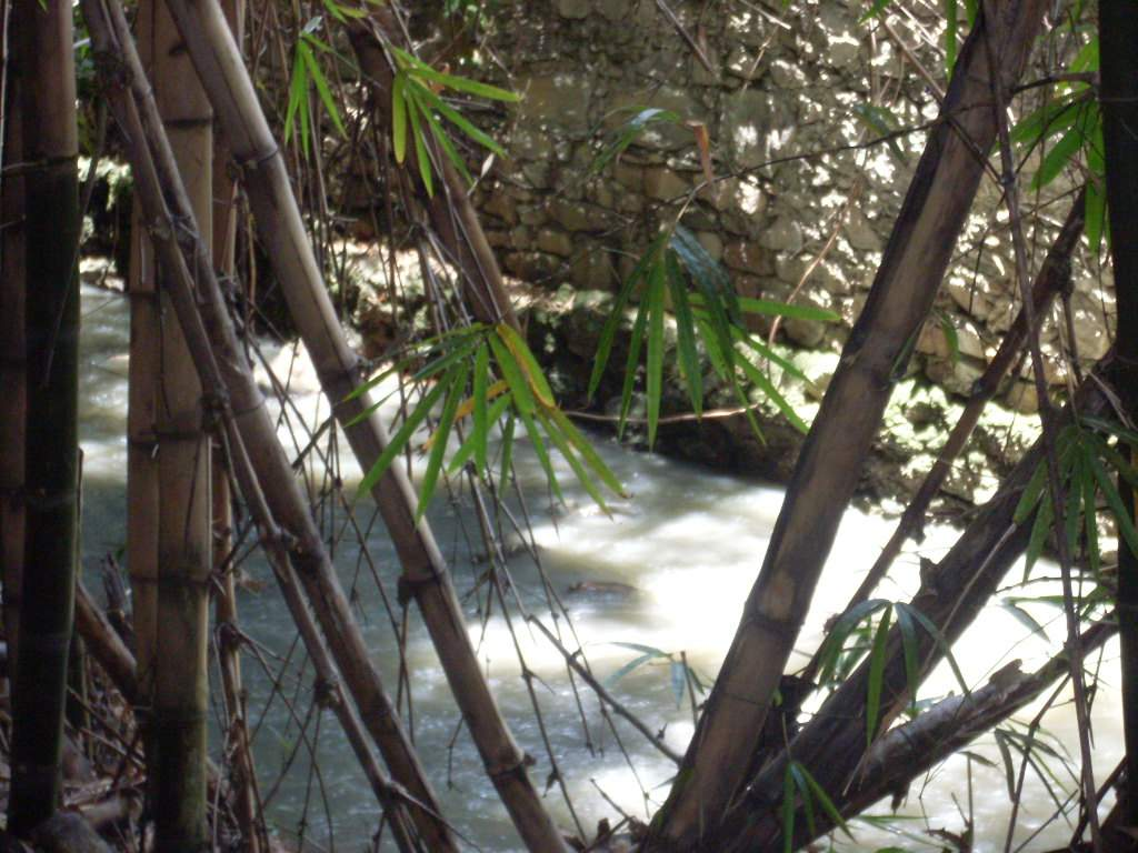 Quebrada Agua de Maíz a nivel del lindero oeste del Parque Generalísimo Francisco de Miranda (Parque del Este), en Caracas - Venezuela (2012)